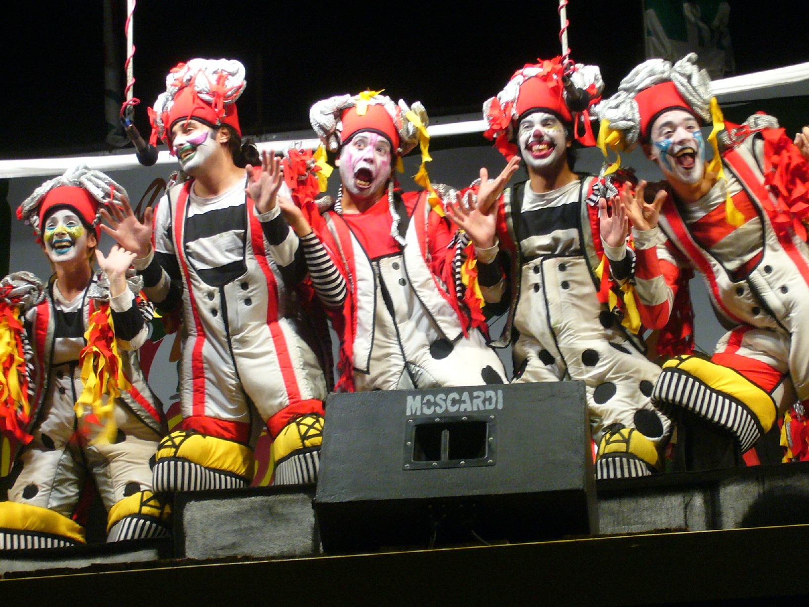 Fotografía de la murga "Queso Magro" durante el carnaval uruguayo de 2008.